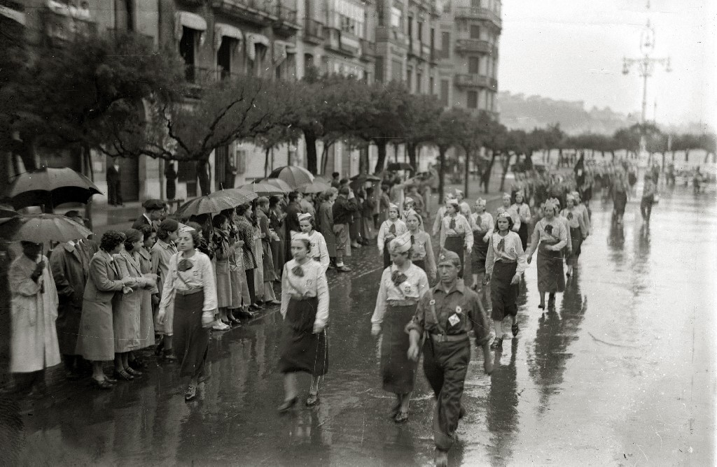 Título original: Desfile militar del Frente Nacional por la avenida de la Libertad (2/4) Localización: San Sebastián (Guipúzcoa)